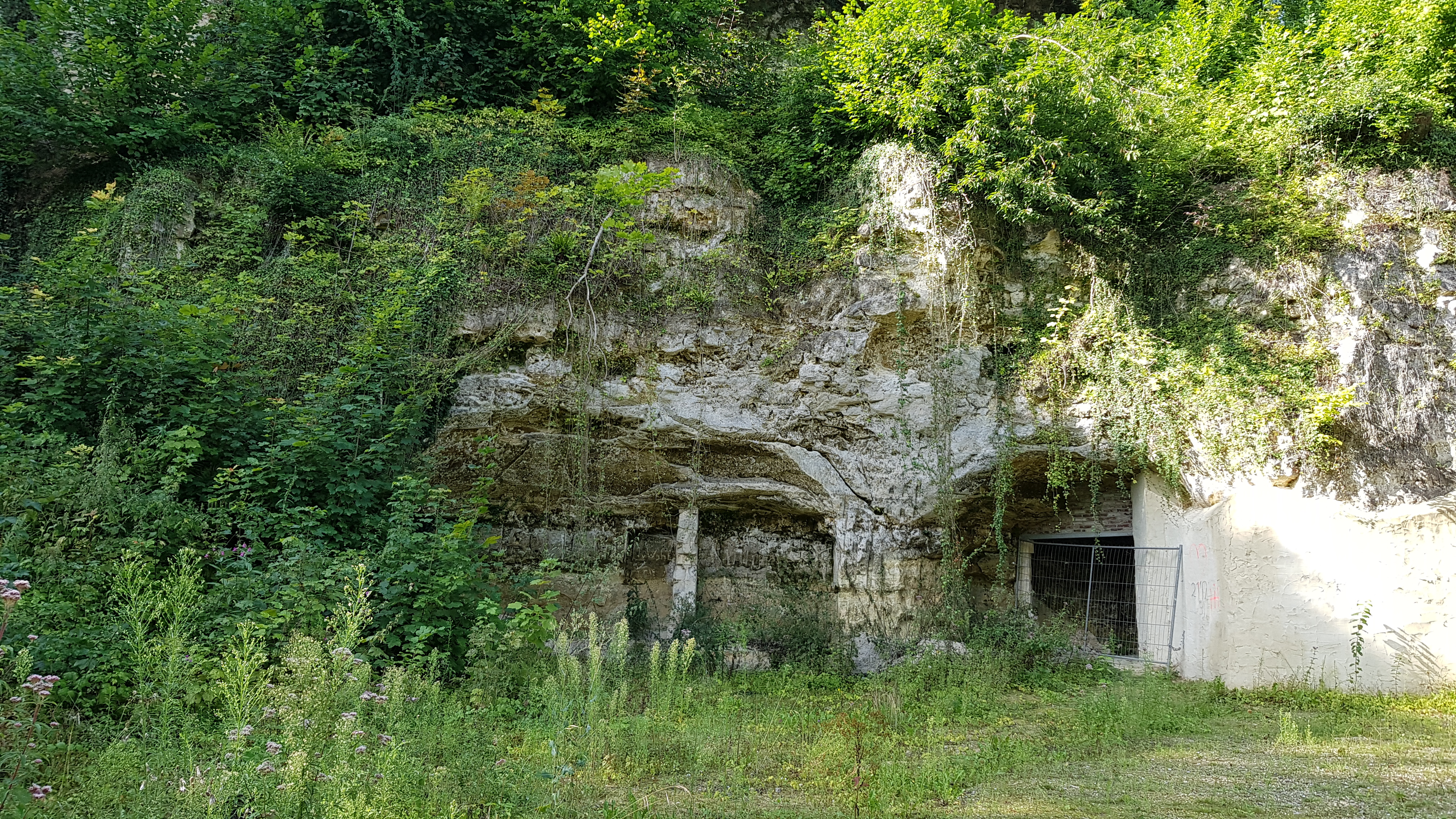 Groeve achter de Kalkbranderij, Geulhem, Nederland